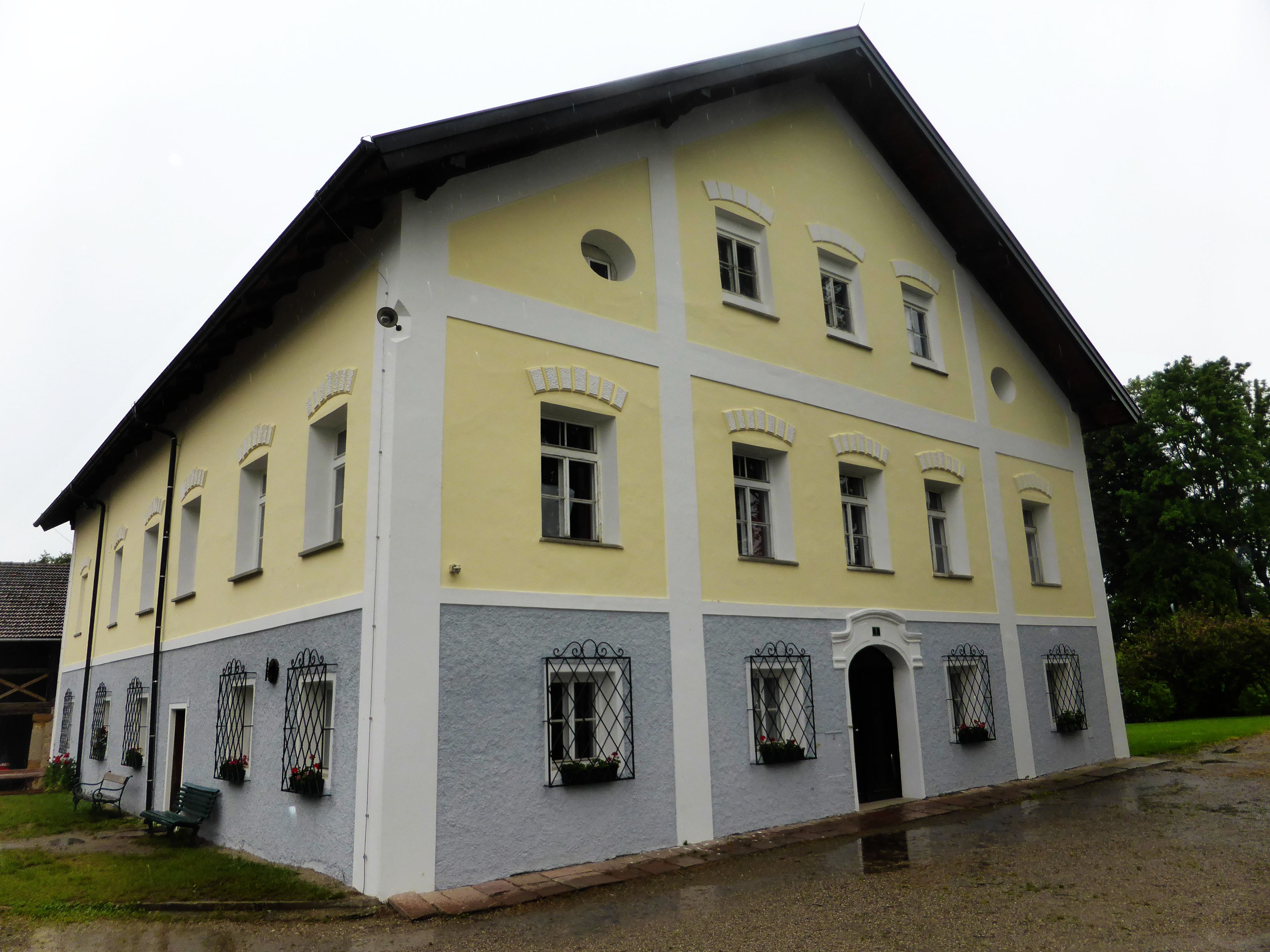 Gesamtanlage Zellhof